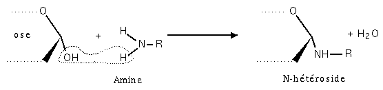 Formation d'un N-hétéroside. Mars 2005 Création personnelle.